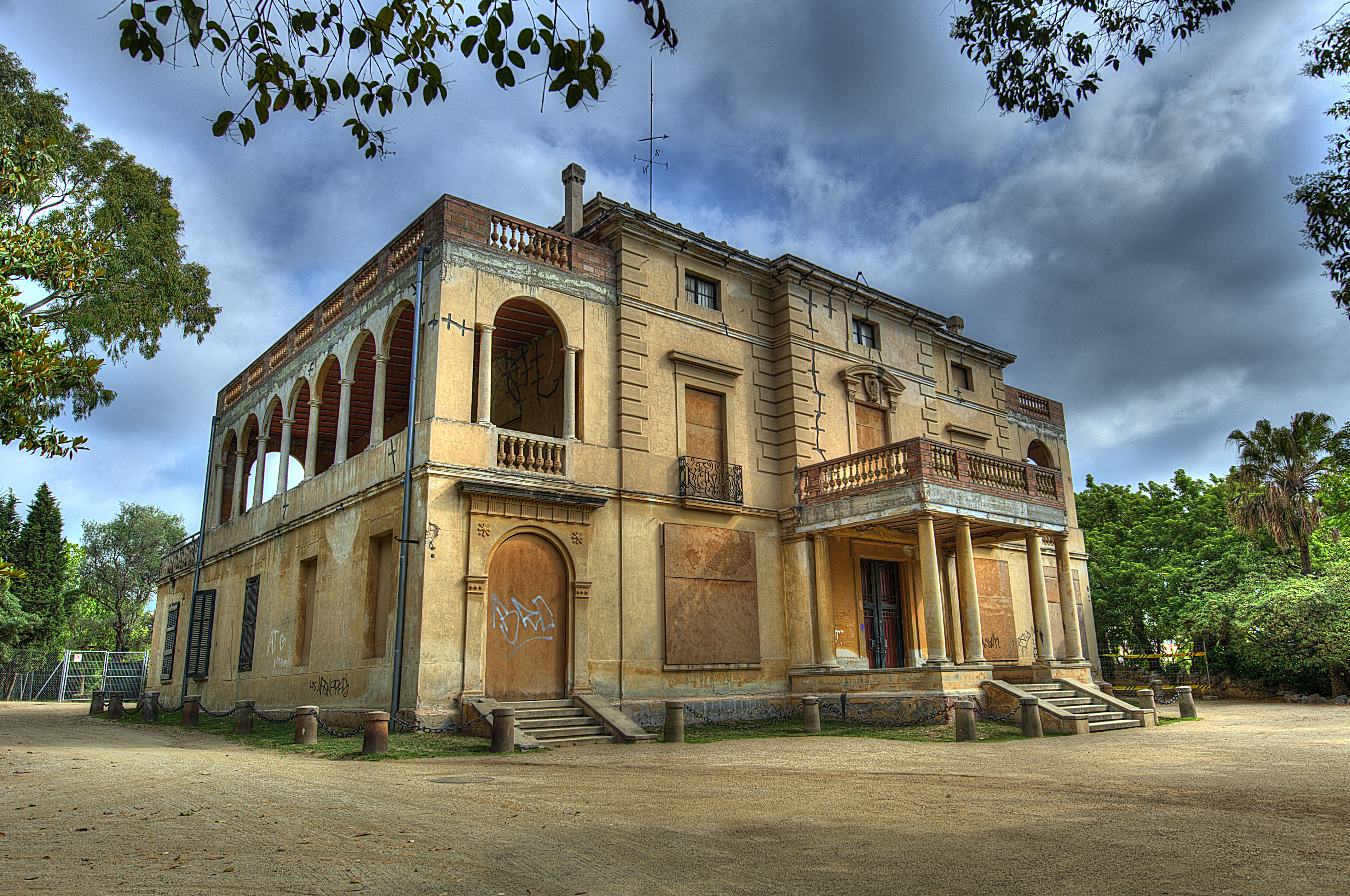 Masia Ca l'Arnus Badalona